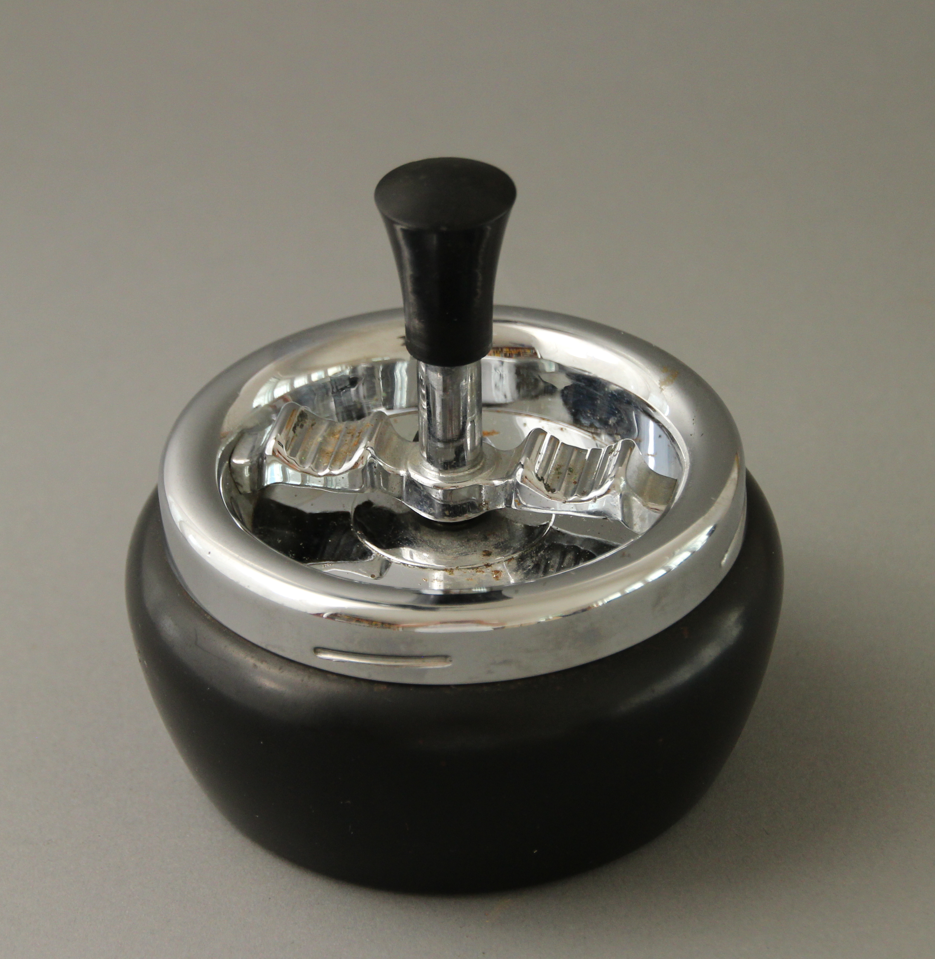 Bildinhalt: Roulette-Aschenbecher vor grauem Hintergrund (sogenannter „Schleuderaschenbecher“) Aufnahmeort: Frankfurt am Main, Deutschland